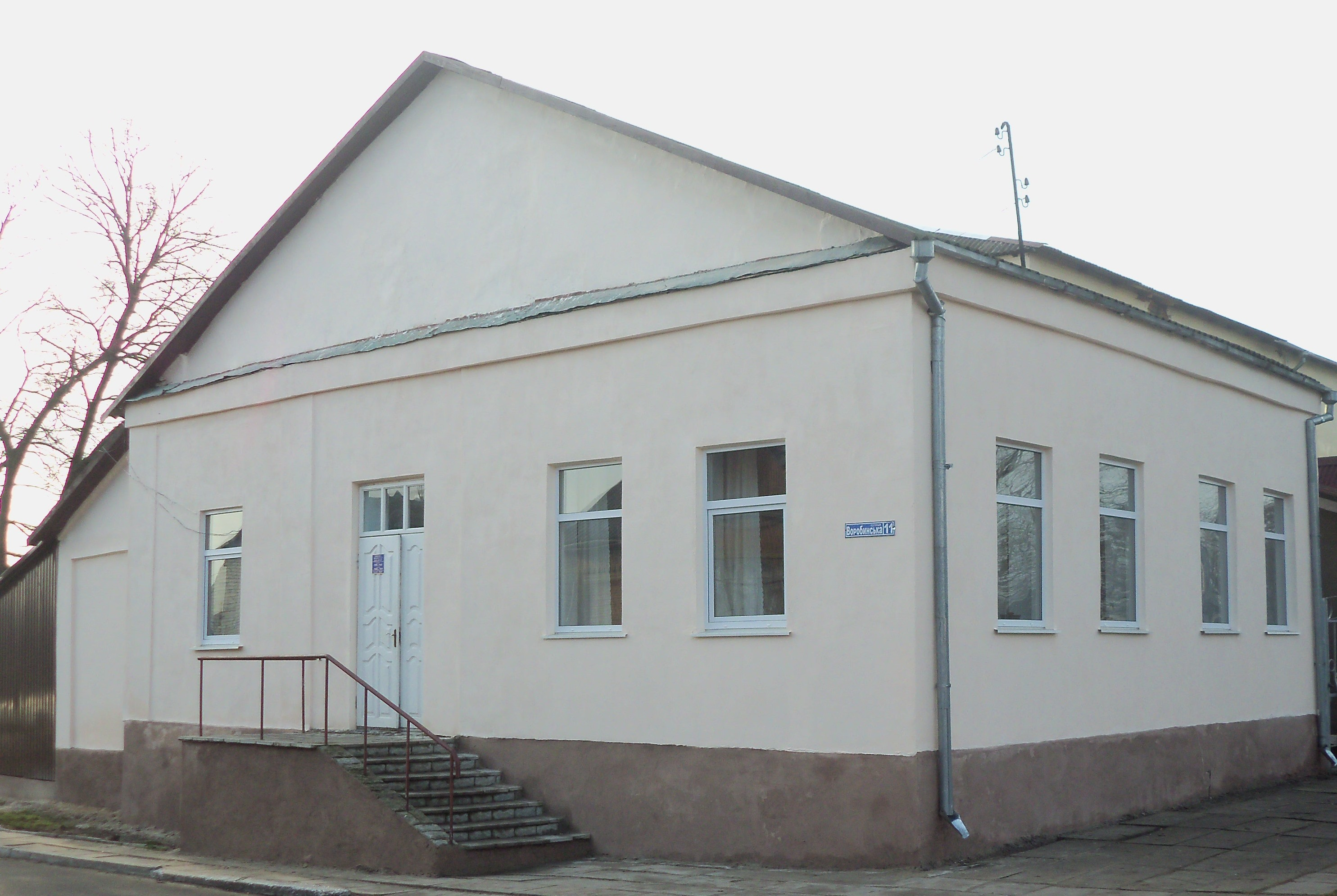 Будівля ( бібліотеки для дітей, м.Дубровиця, вул.Воробинська, 11